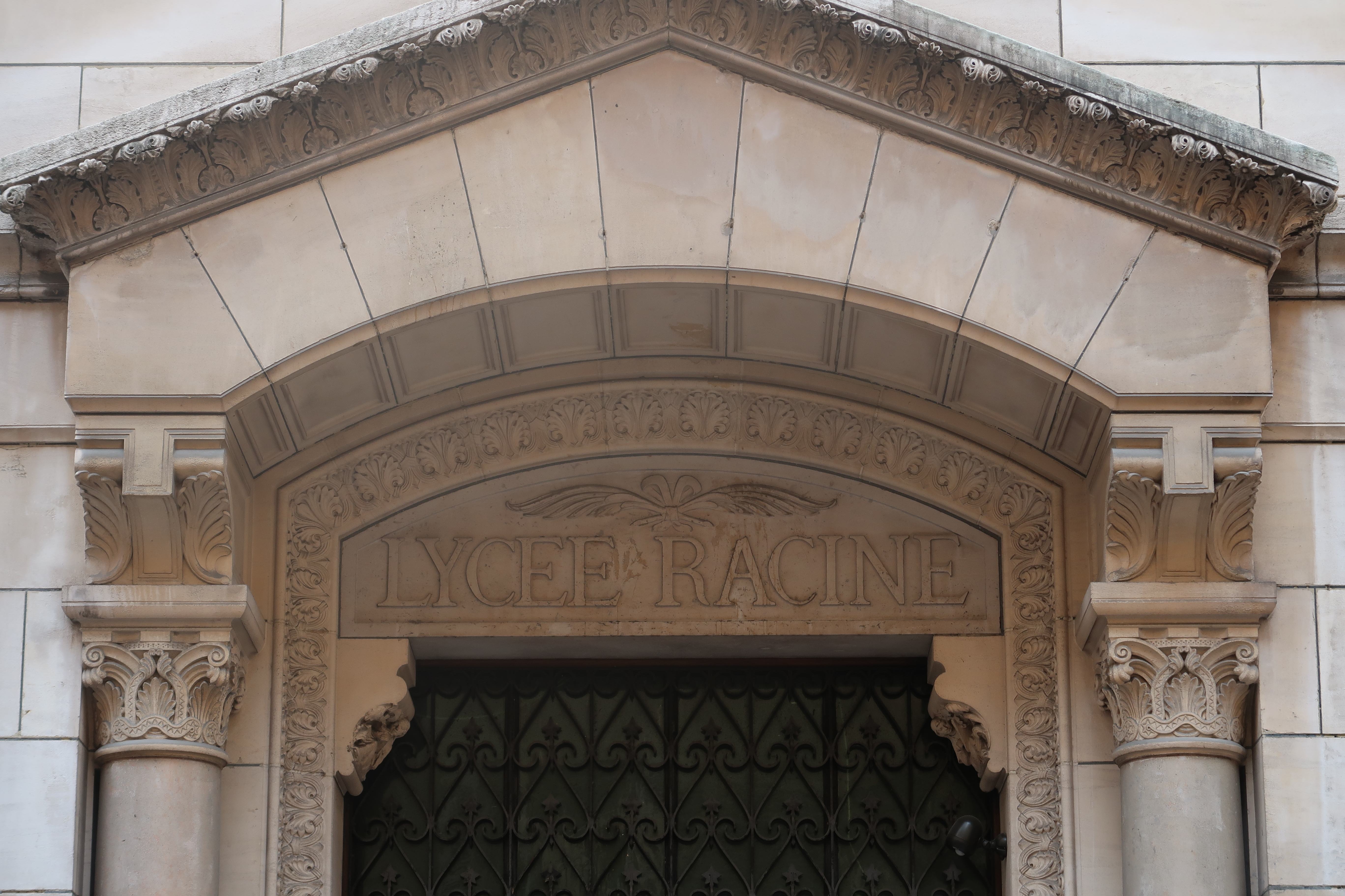 Fronton du lycée Racine, 20 rue du Rocher (Paris, 8e).